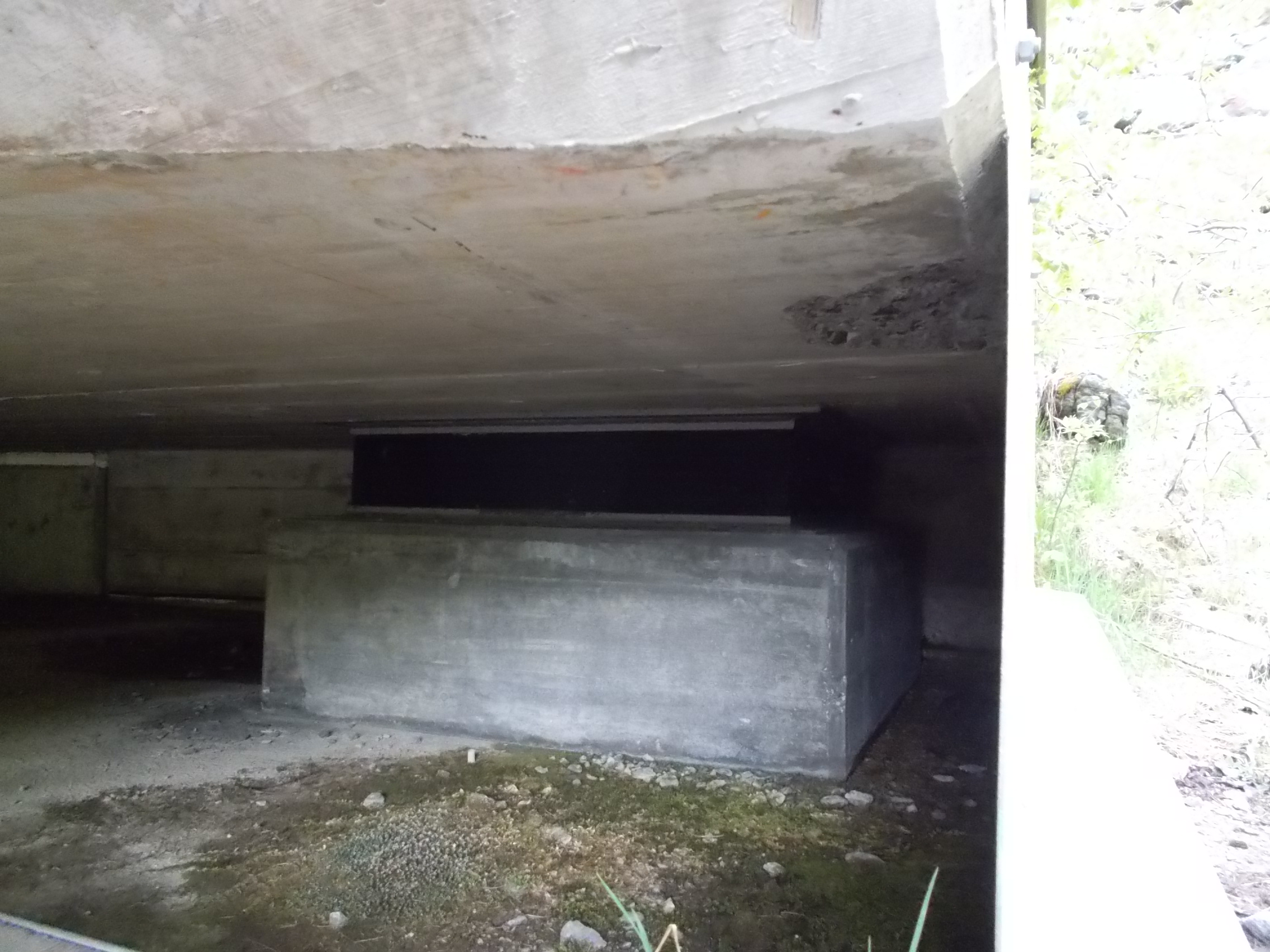 Ein die Gleiseinhausung tragender, schwingungsdämpfender Gummipuffer.